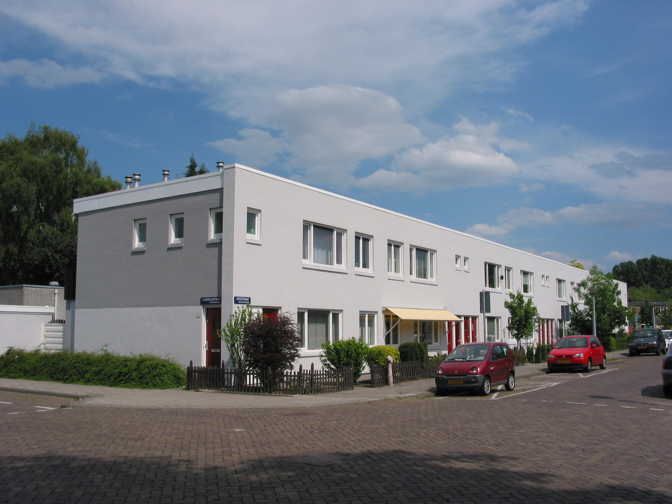 Hermann Friedrich Mertens (1885-1960; architect). Woonhuizen, Oogststraat, Betondorp, Amsterdam. 1924 (oplevering).